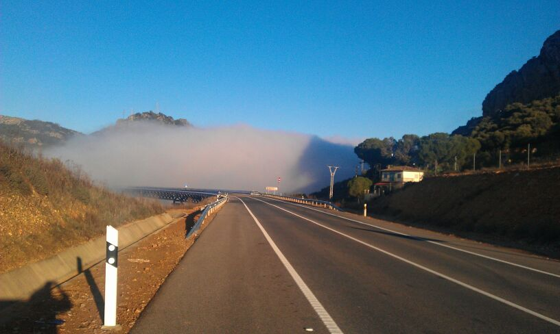 Rio Guadiana; enlances pantano de Orellana y Garcia Sola This is a photography of a Site of Community Importance in Spain with the ID: ES0000068. Natura2000 entry, EEA entry